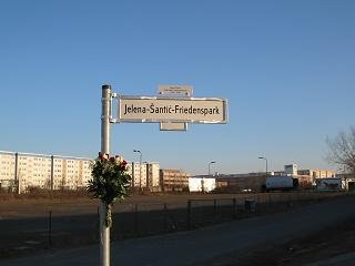 Jelena-Šantić-Friedenspark у Берлину